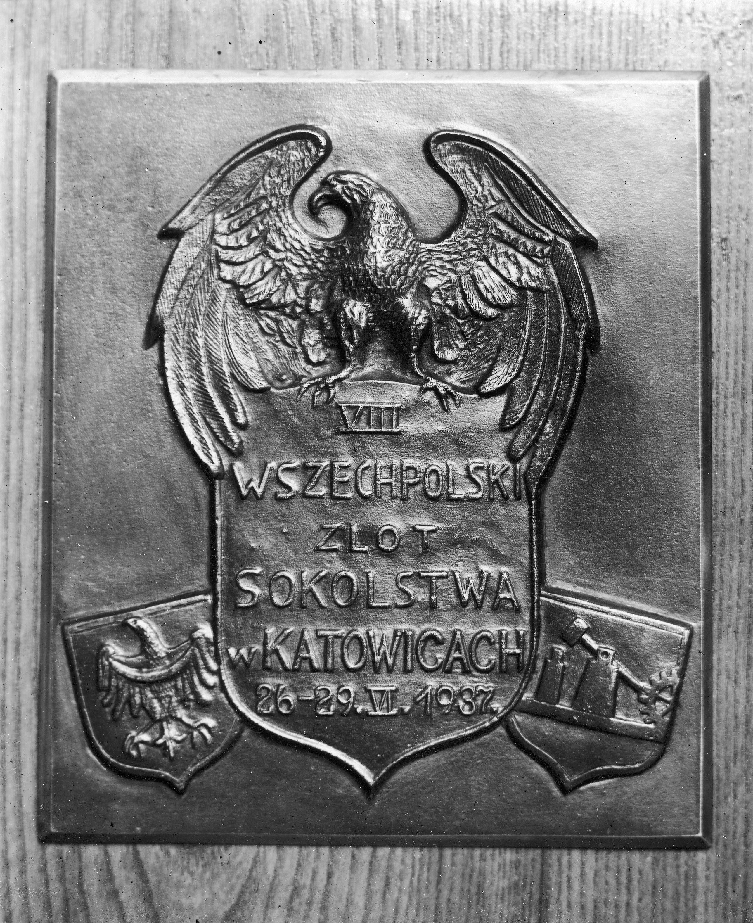 1937 Ósmy ogólnopolski zlot Towarzystwa Gimnastycznego "Sokół" w Katowicach zorganizowany w 70 rocznicę utworzenia sokolstwa polskiego i 15 rocznicę powrotu Śląska do Macierzy Polskiej. Plakietka okolicznościowa.